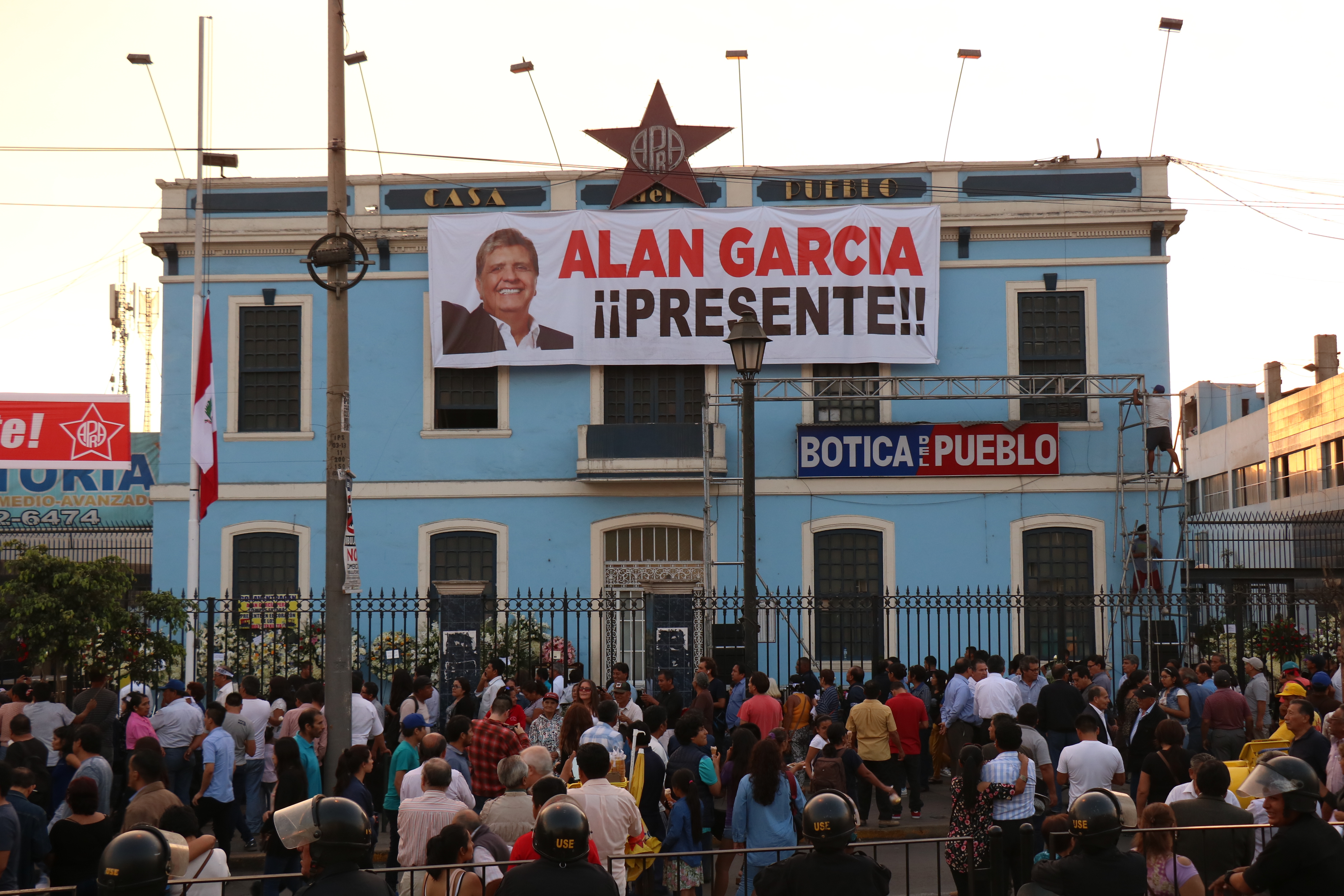 Personas reunidas frente a la Casa del Pueblo durante el velorio del ex presidente Alan García.